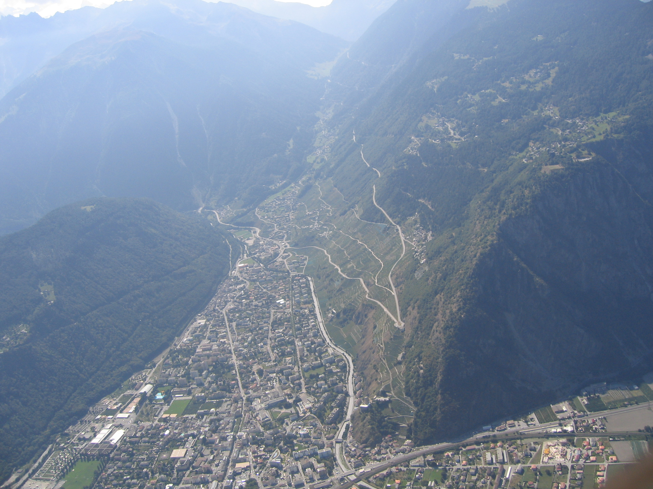 Martigny-Combe, avec Martigny au premier plan, le Mont-Chemin puis le Mont Bovine à gauche, le Mont Ravoire et l'Arpille à droite, le vallon de La Combe jusqu'au col de la Forclaz au centre